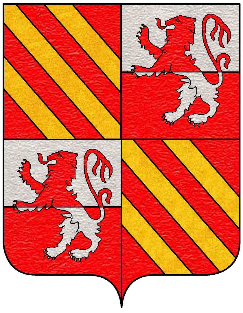 Stemma della famiglia Aquino